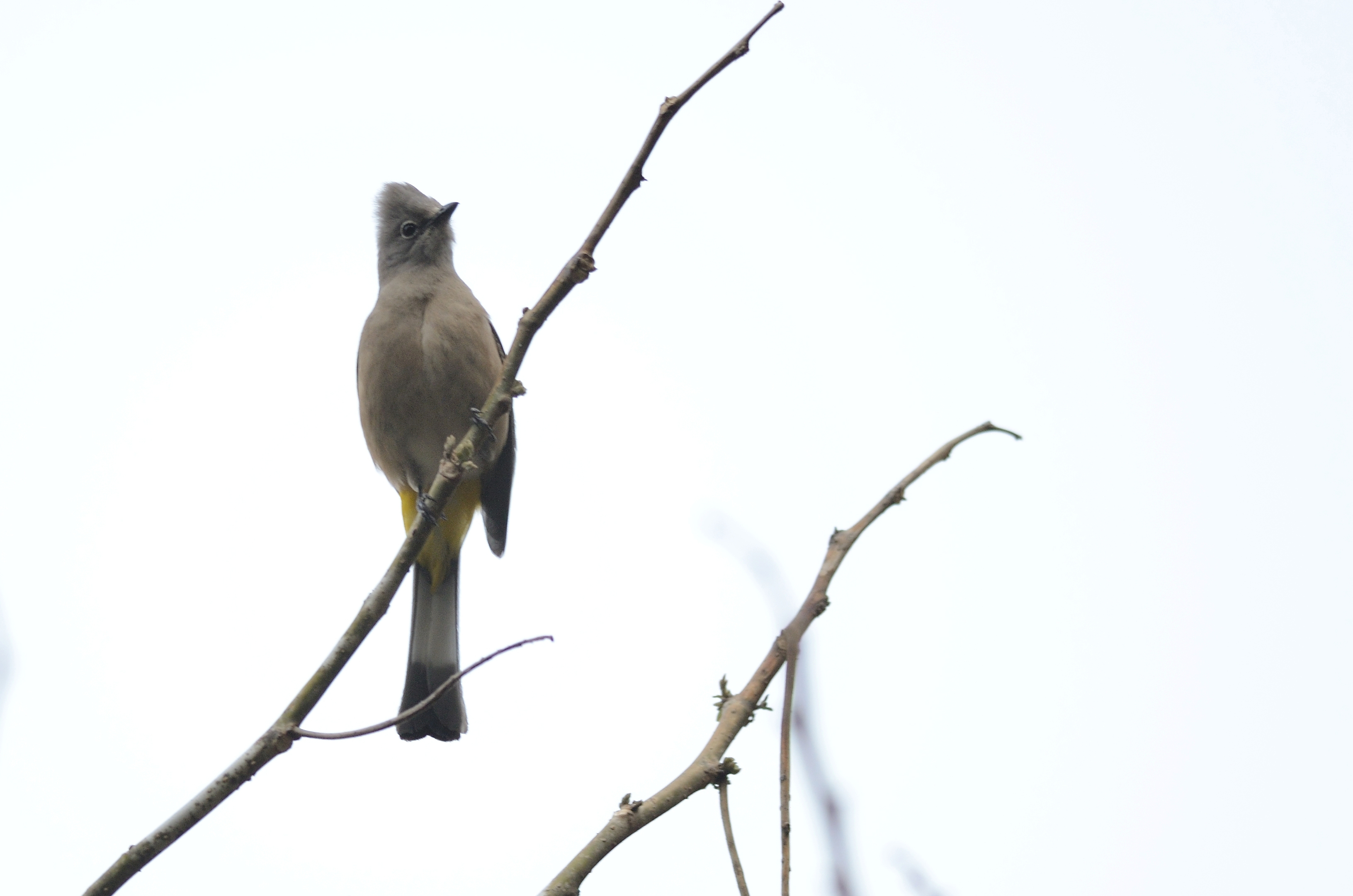 Ptilogonys cinereus